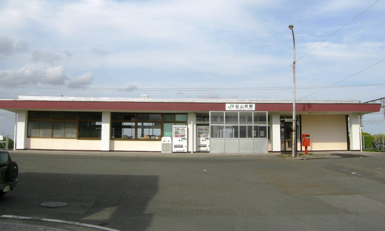 JR東北本線 松山町駅駅舎（JR Tohoku line,Matsuyamamachi station）